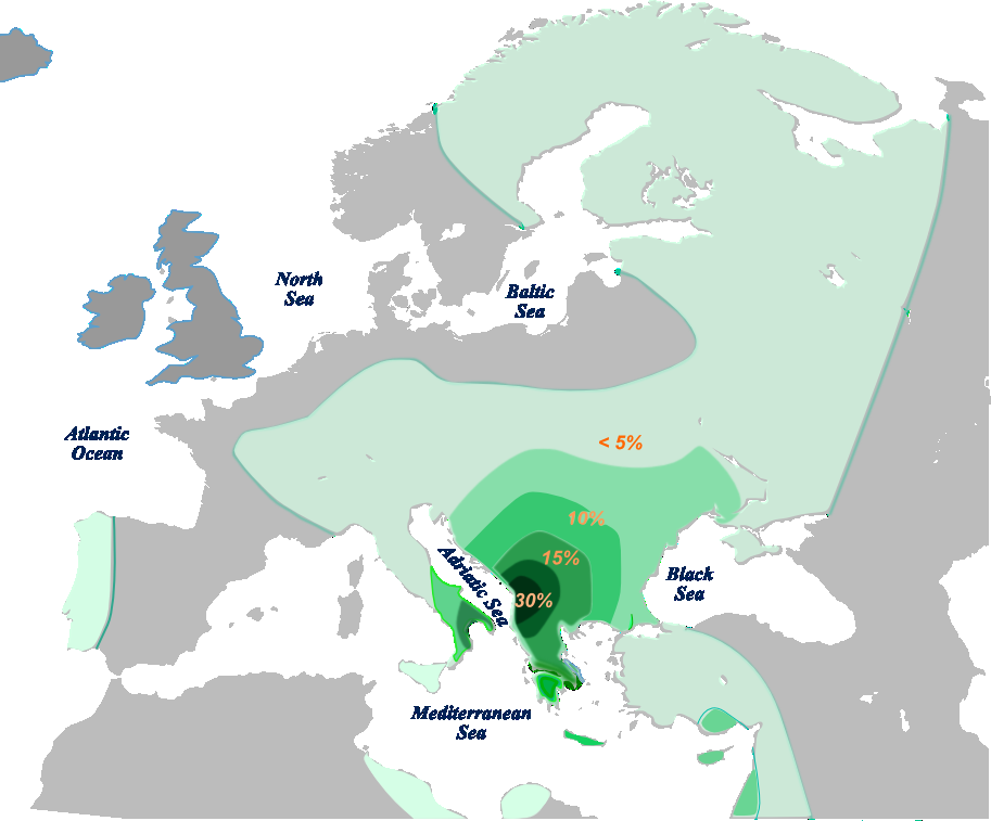 Distribución del haplogrupo E1b1b1a2=E-V13 del ADN-Y según Cruciani et al 2007.